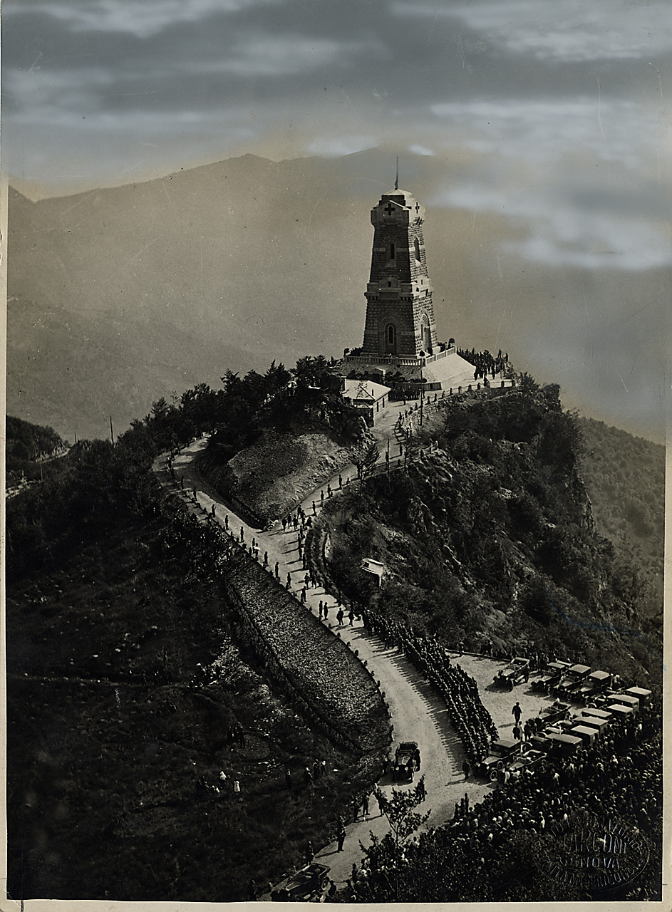 Inagurazione dell'Ossario sul Pasubio.